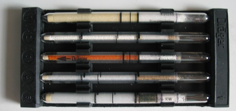 Simultantest III.